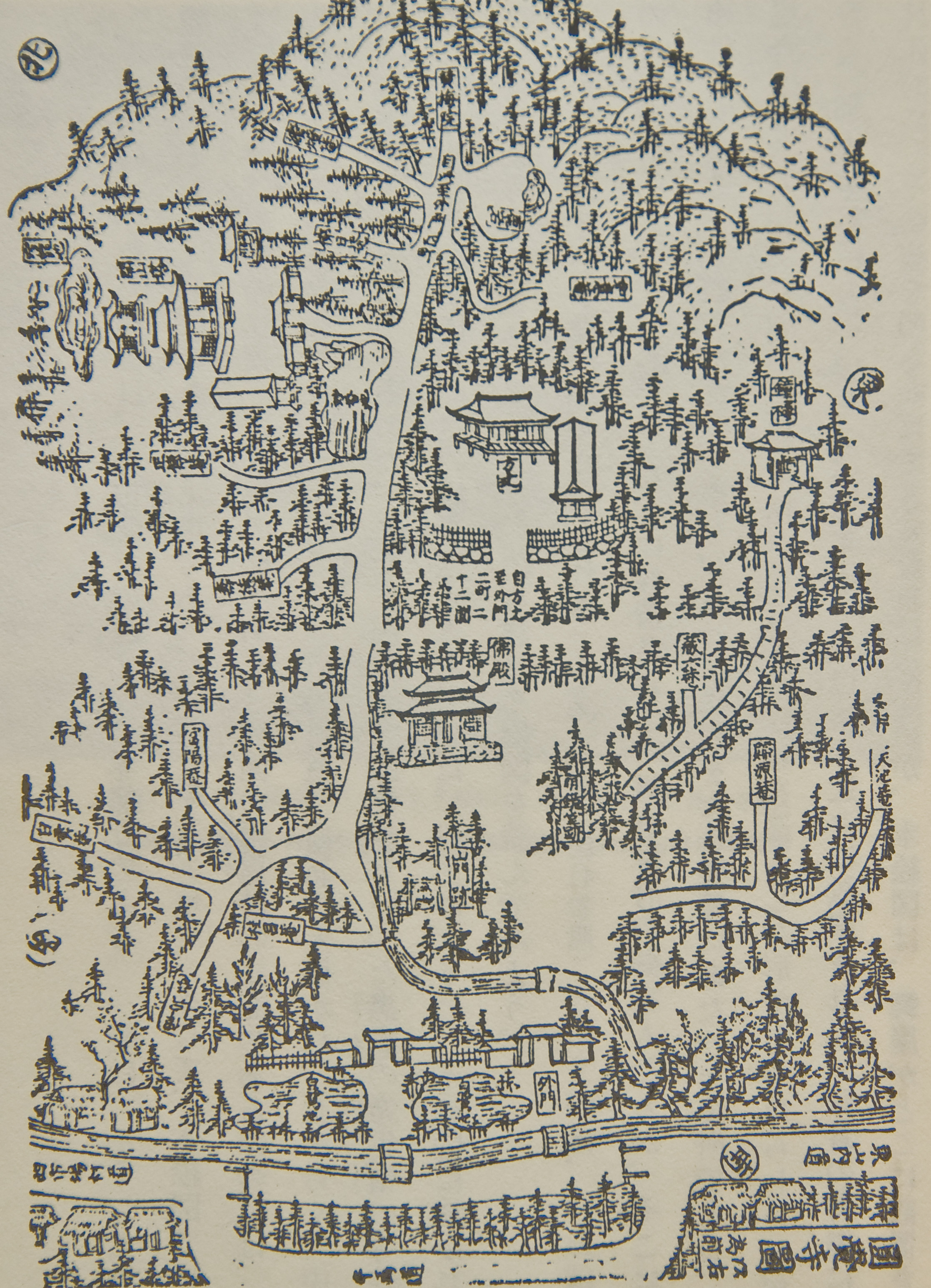 A map of Kita-Kamakura, Japan, from the Shinpen Kamakurashi (1685)